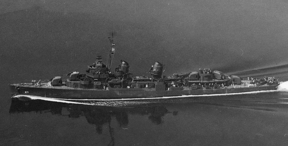 The U.S. Navy destroyer USS Gatling (DD-671) underway in 1943.